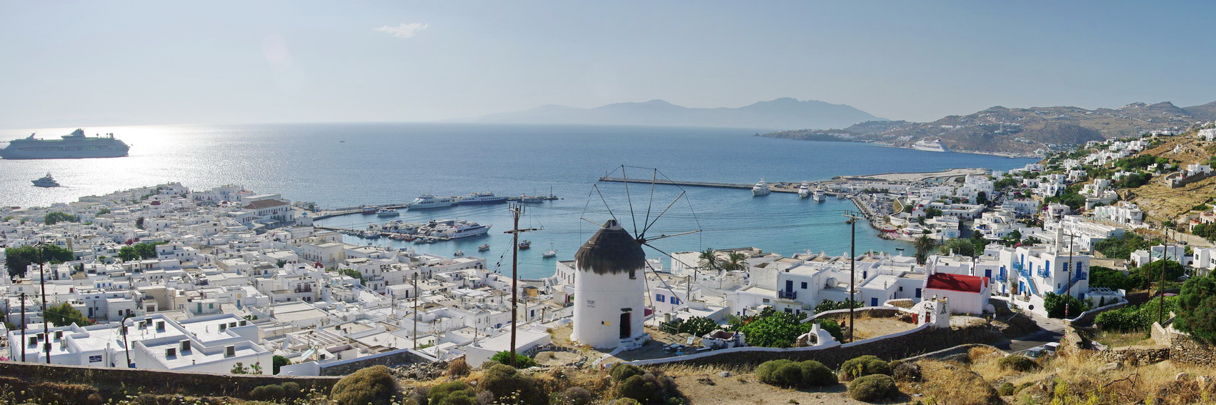 Panorama Mykonos